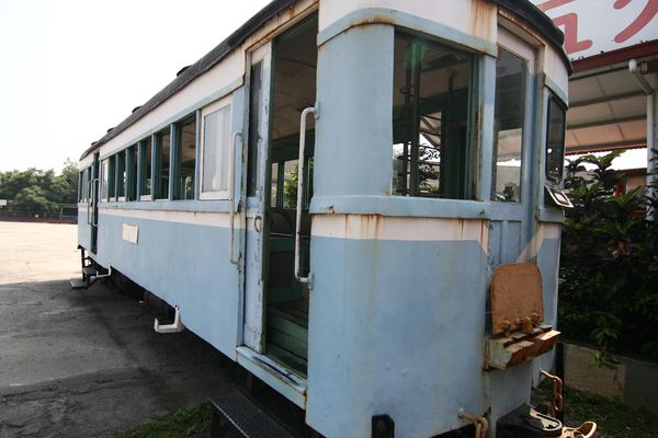 Yamay Sugar Railway Railcar月眉觀光糖廠柴油車